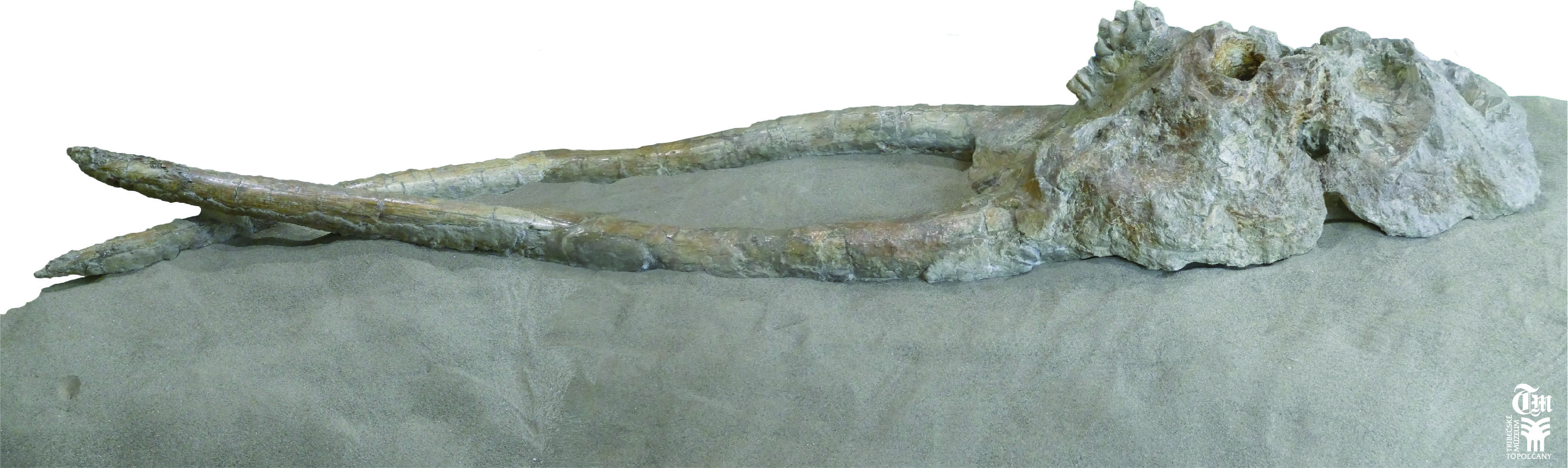 Zbierkový predmet